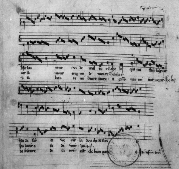 Paris, Bibliothèque Nationale, Coll. de Picardie 67